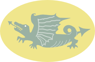 Godło - znak 16 Brygady Pancernej Polskich Sił Zbrojnych na Zachodzie